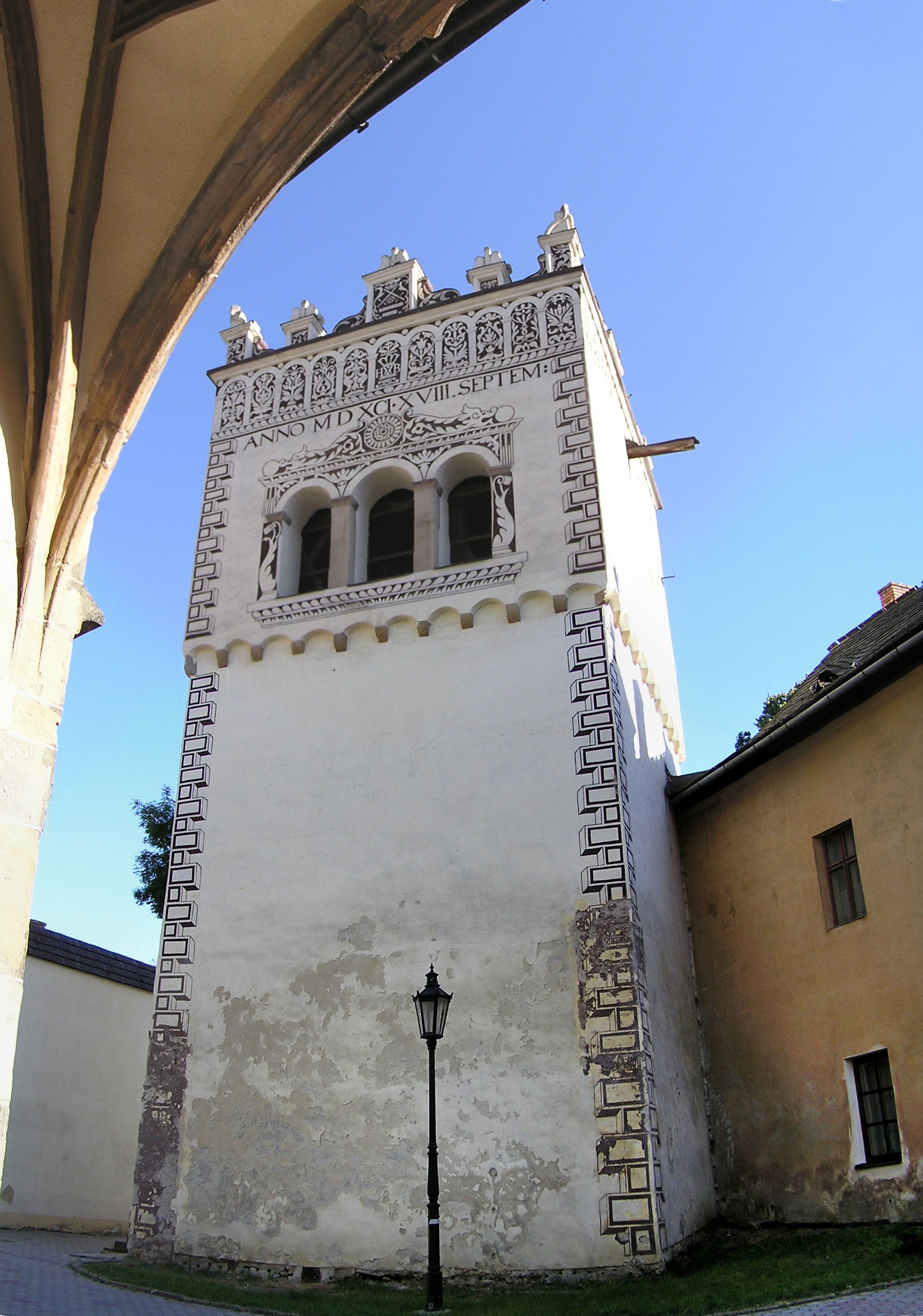 Zvonica